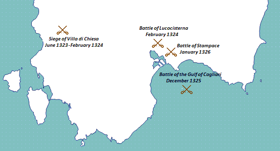 Principali battaglie tra Aragona e Pisa in Sardegna, 1323 - 1326